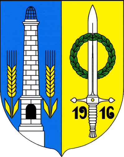 Znak obce Mikulášovice